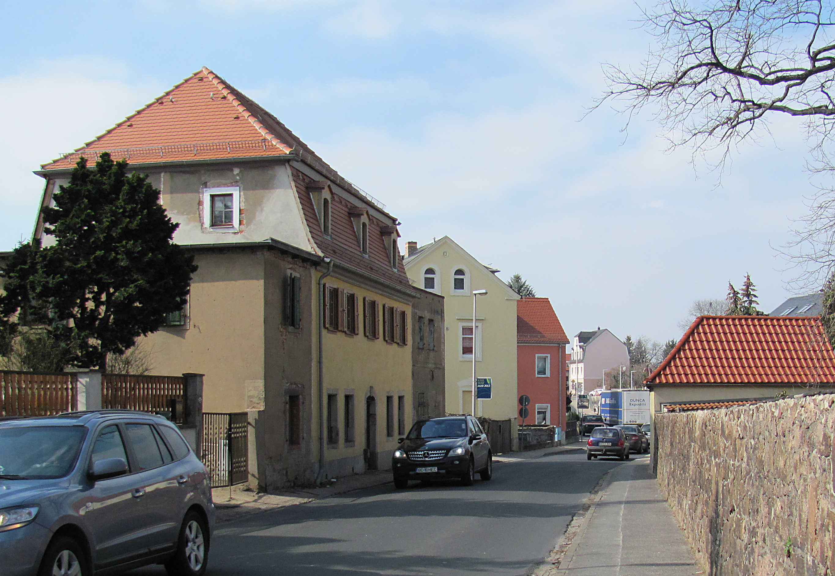 Radebeul, Fürstenhain, Kötzschenbrodaer Straße